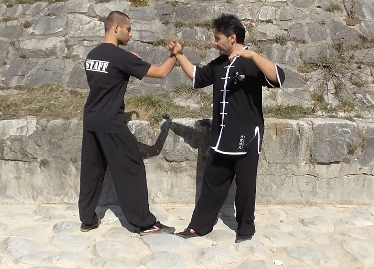 Nella foto il Maestro Marco Gamuzza spiega l'esercizio del Tui Shou